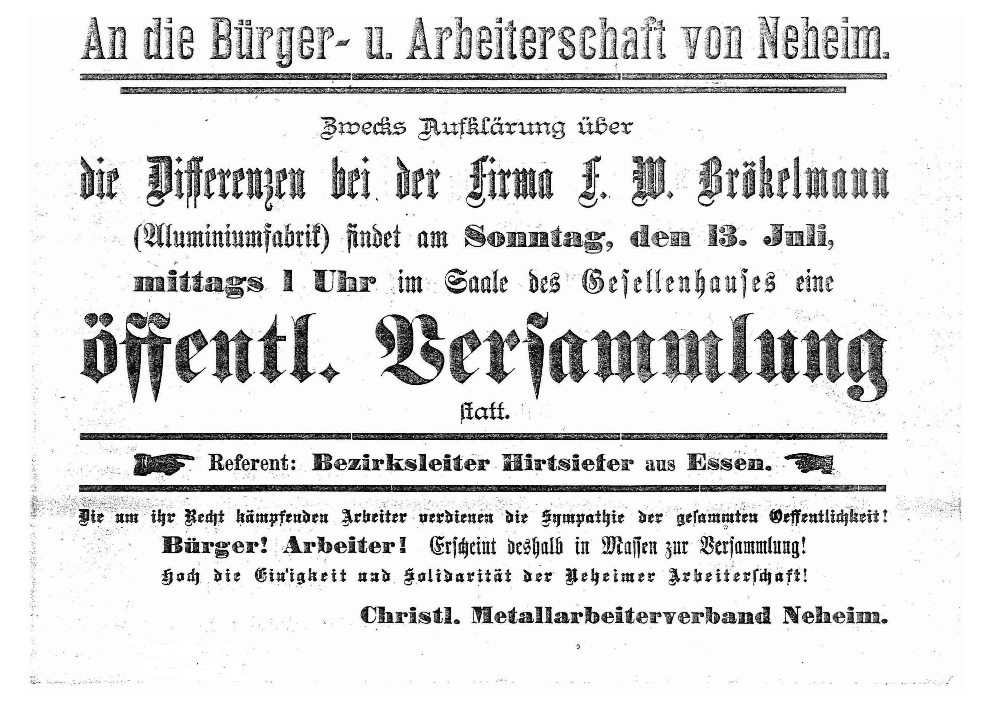 Streikaufruf Firma Brökelmann Neheim von 1913